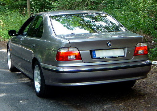 BMW 520i